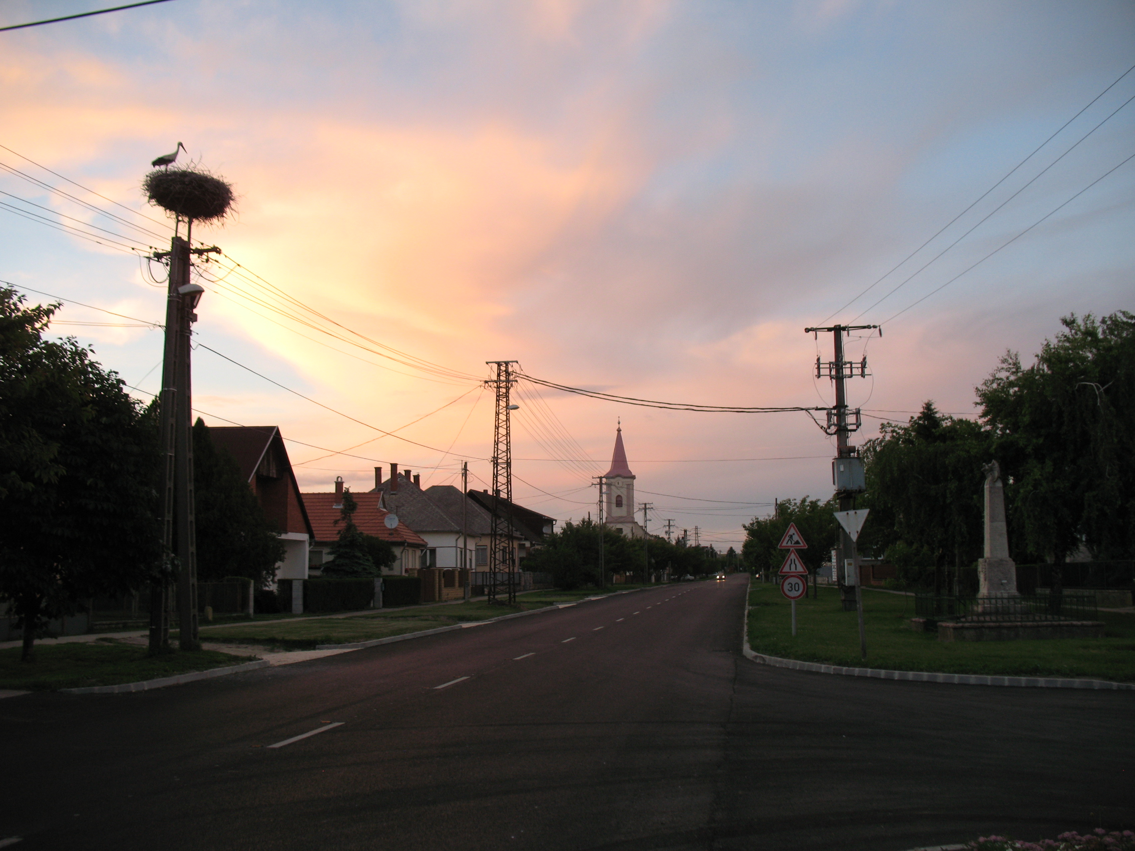 Bana falu